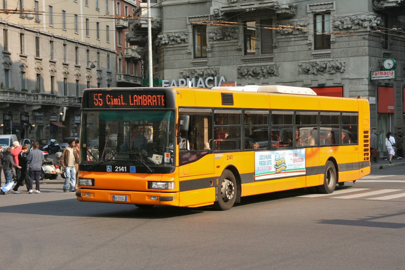 Autobus n. 2141 dell'ATM di Milano in piazza Argentina.